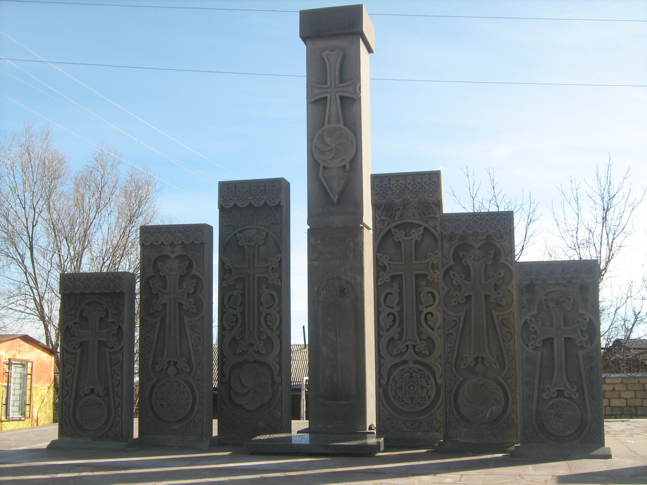 Խաչքար-հուշարձան Խնձորեսկում